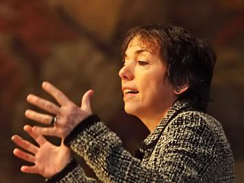 Dr. Margot Käßmann, Landesbischöfin der Evangelisch-lutherischen Landeskirche Hannovers und EKD-Ratsvorsitzende, bei dem XII. Marburger Ökumenegespräch am 23. Januar 2010 in Marburg, Deutschland. (Fotograf: Rolf K. Wegst)